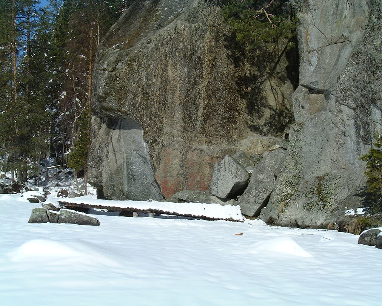 Fångsjön